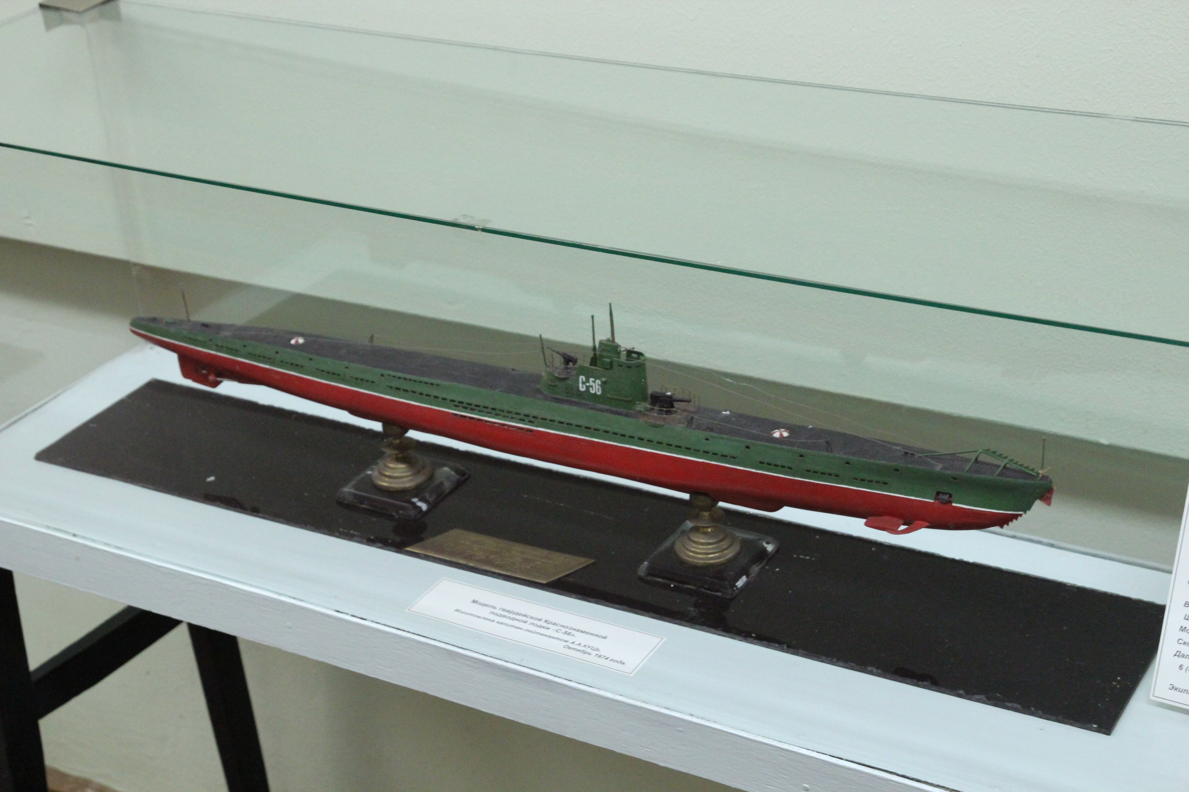 Модель подводной лодки С-56